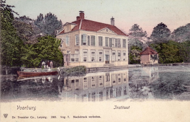 Prentbriefkaart van het huis "In de Wereldt is veel Gevaer" uit 1905